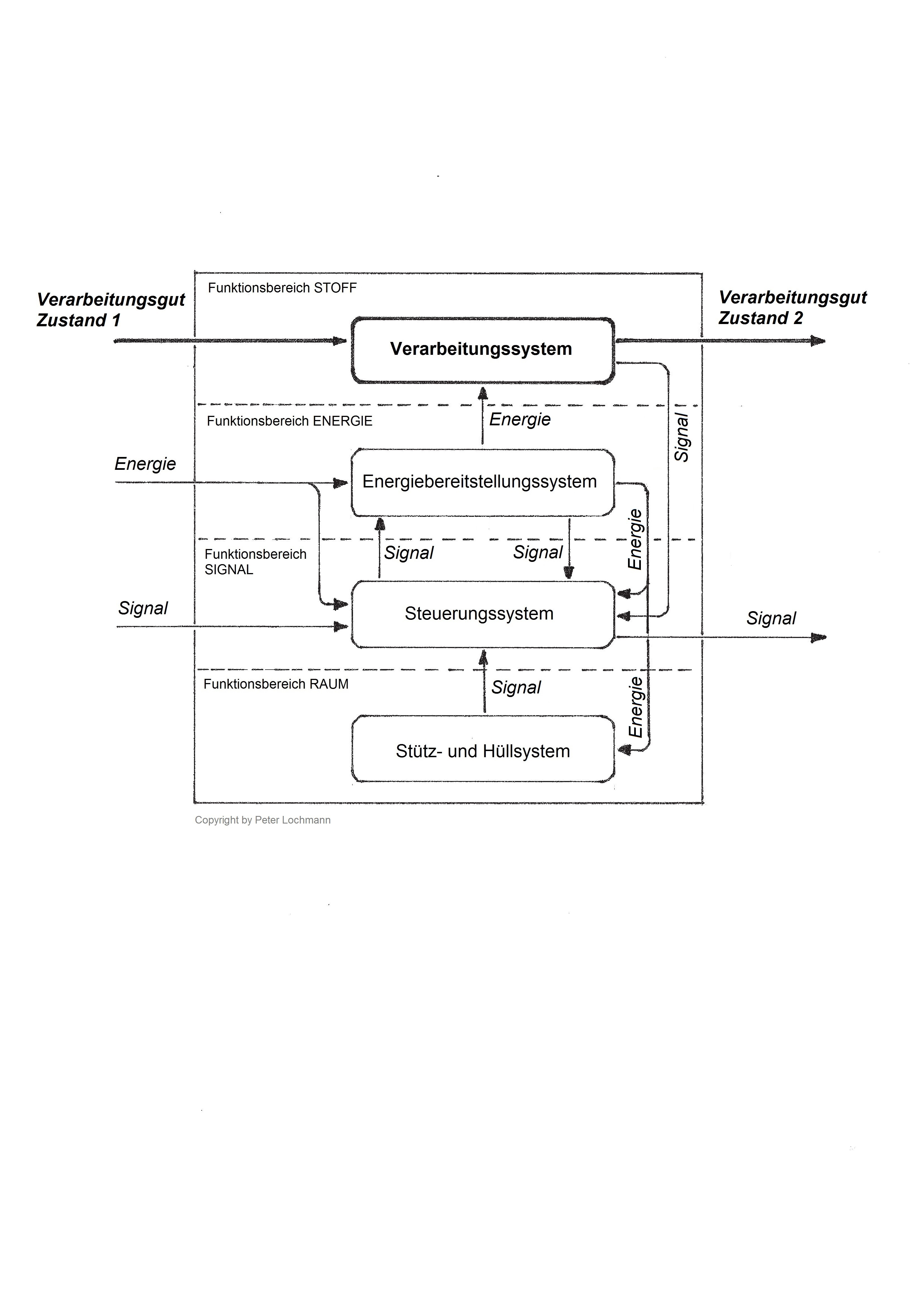 Prinzipielle Funktionsstruktur einer Verarbeiungsmaschinen mit ihren Teilsystemen und Funktionsbereichen.